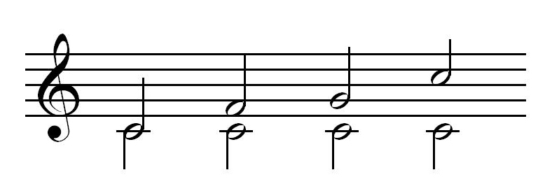 Srpskohrvatski / српскохрватски: Notni prikaz "savršenih konsonanci"